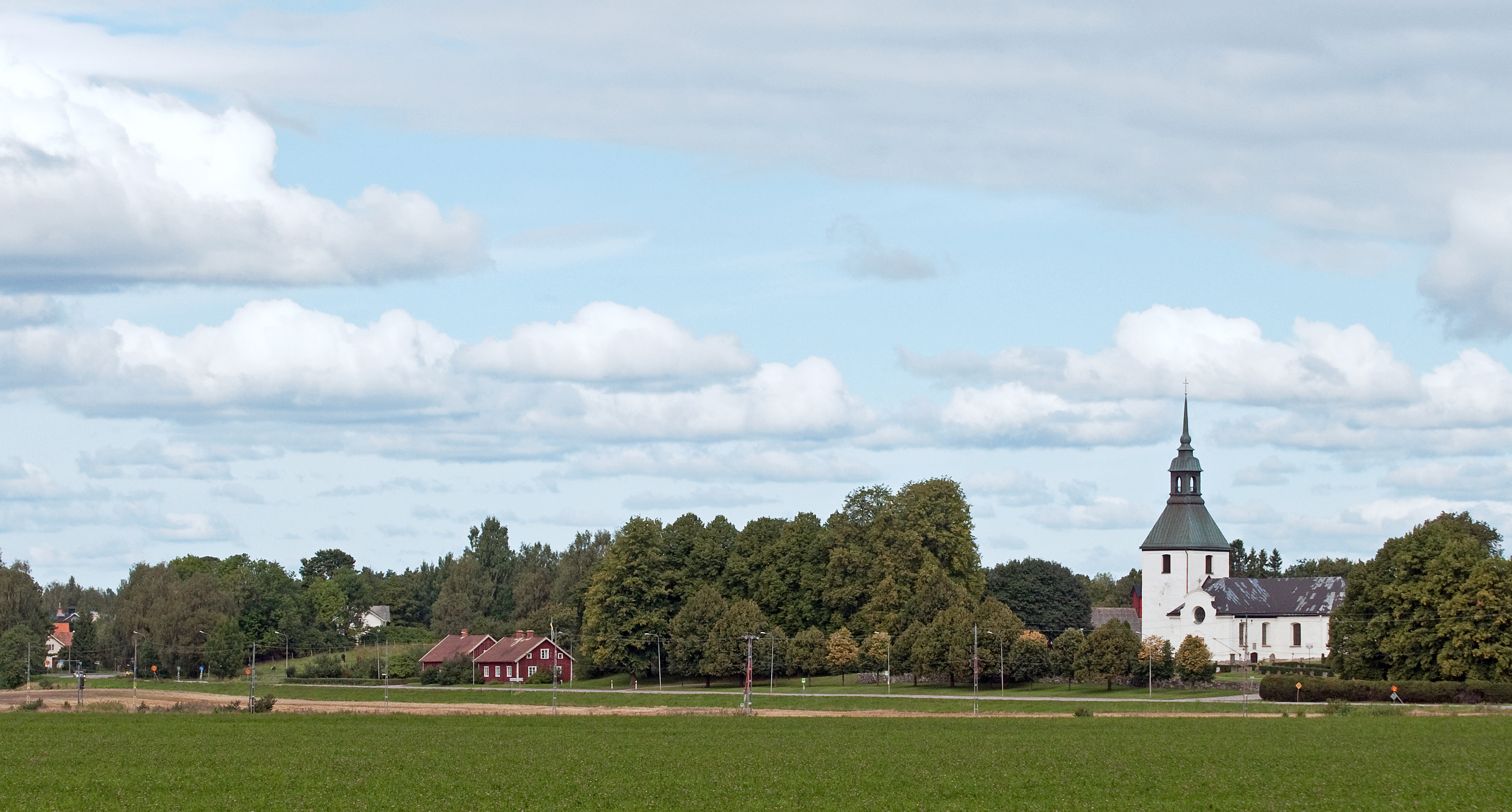 Stigtoma tätort i Nyköpings kommun